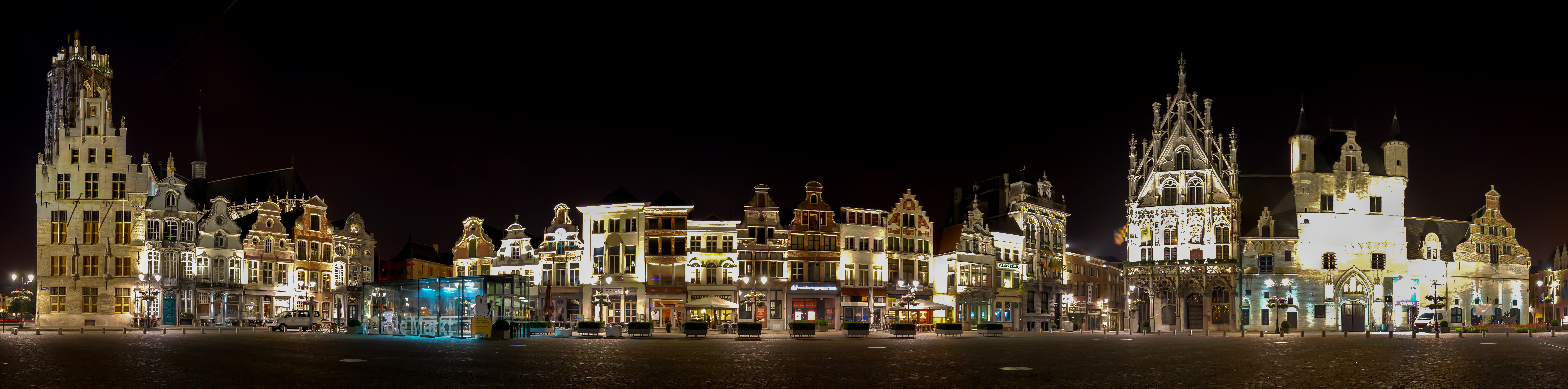 Een avondpanorama van de grote markt in Mechelen